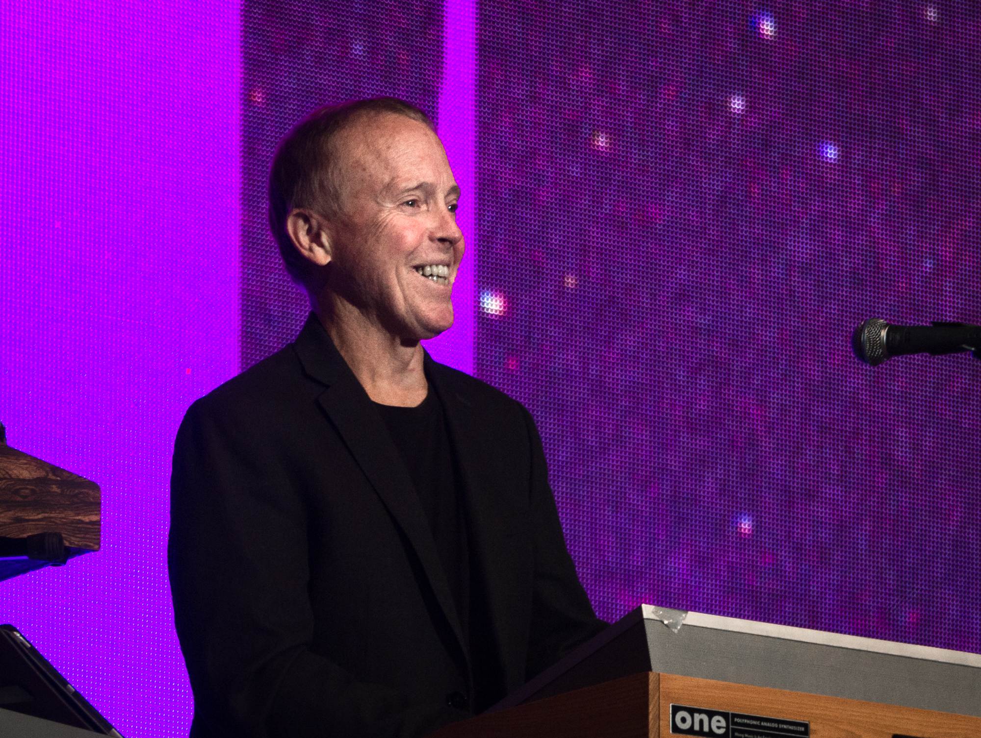 Greg FitzPatrick uppträder med Adolphson & Falk på Gustav Adolfs torg på Stockholms Kulturfestival 2019.